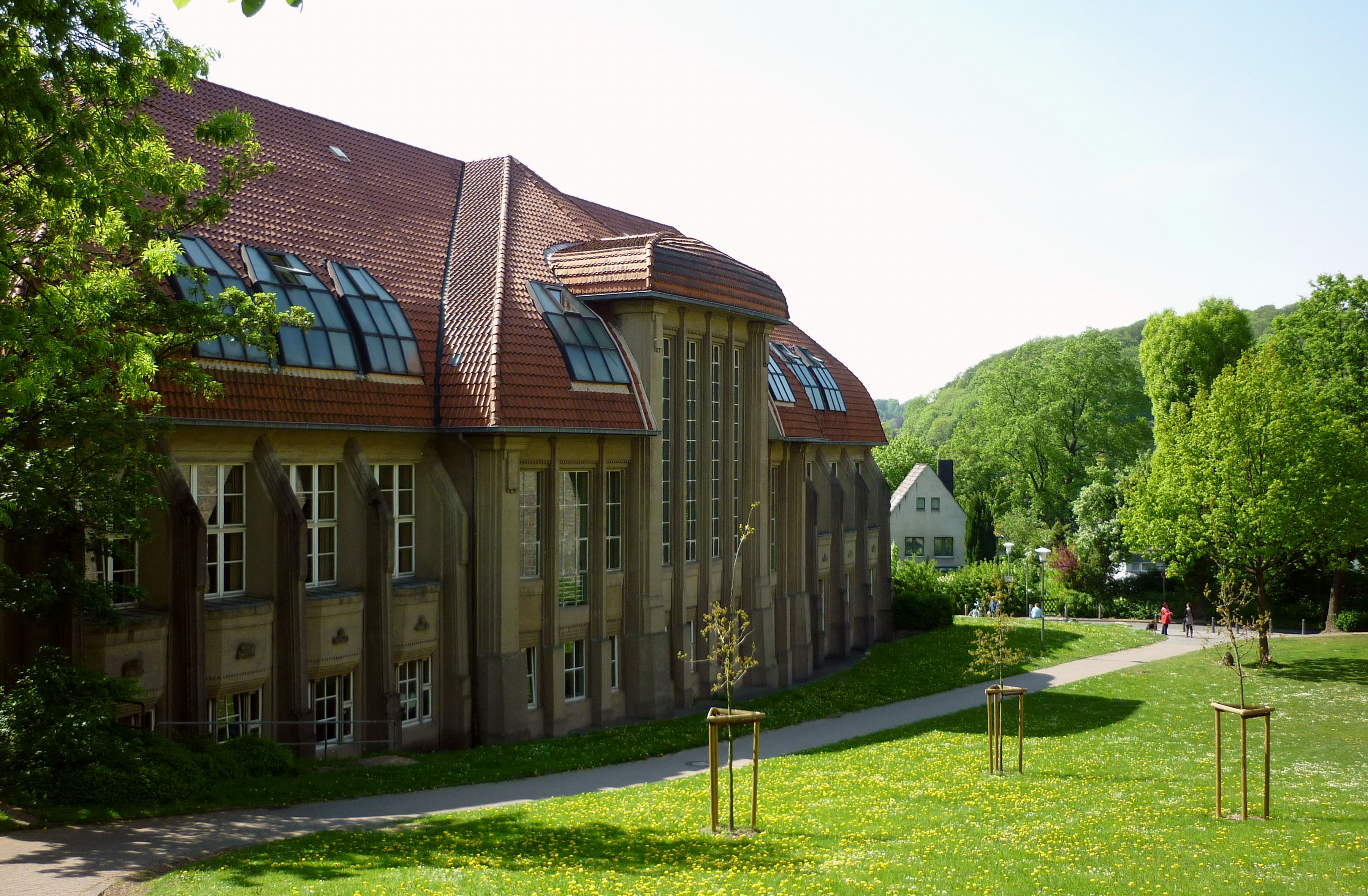 Musik- und Kunstschule in Bielefeld, erbaut 1913 als Gebäude der damaligen Handwerker- und Kunstgewerbeschule Bielefeld